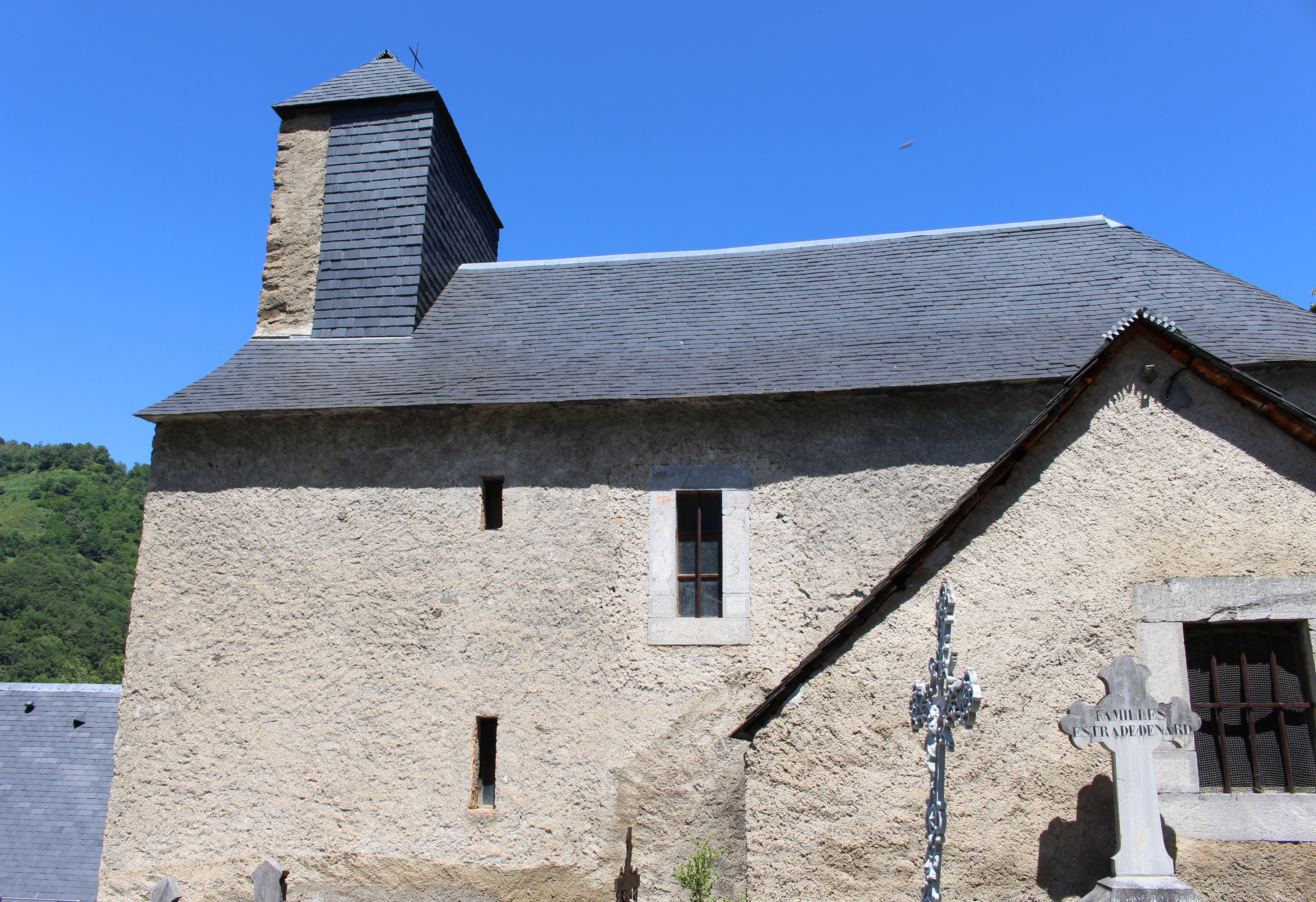 Église Saint-Saturnin de Fréchet-Aure (Hautes-Pyrénées)